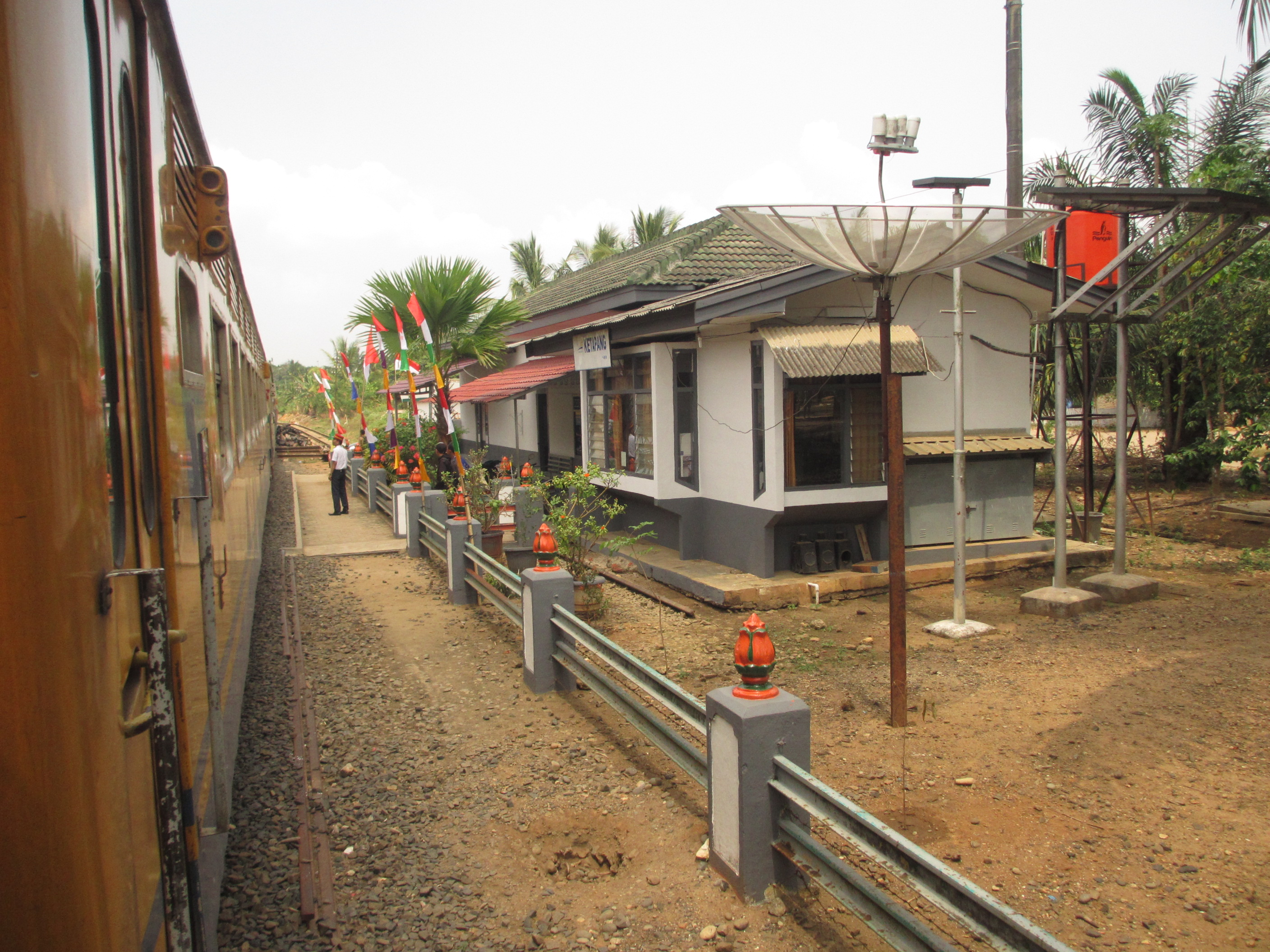 Stasiun Ketapang.